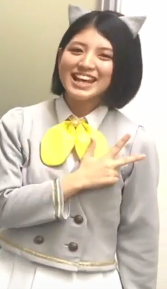 わーすたです。